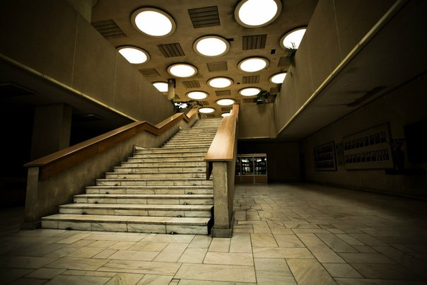 Institute of Scientific Information on Social Sciences (Stairs)